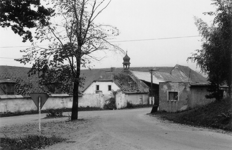 Groß Meierhöfen (Velké Dvorce): Dorfansicht